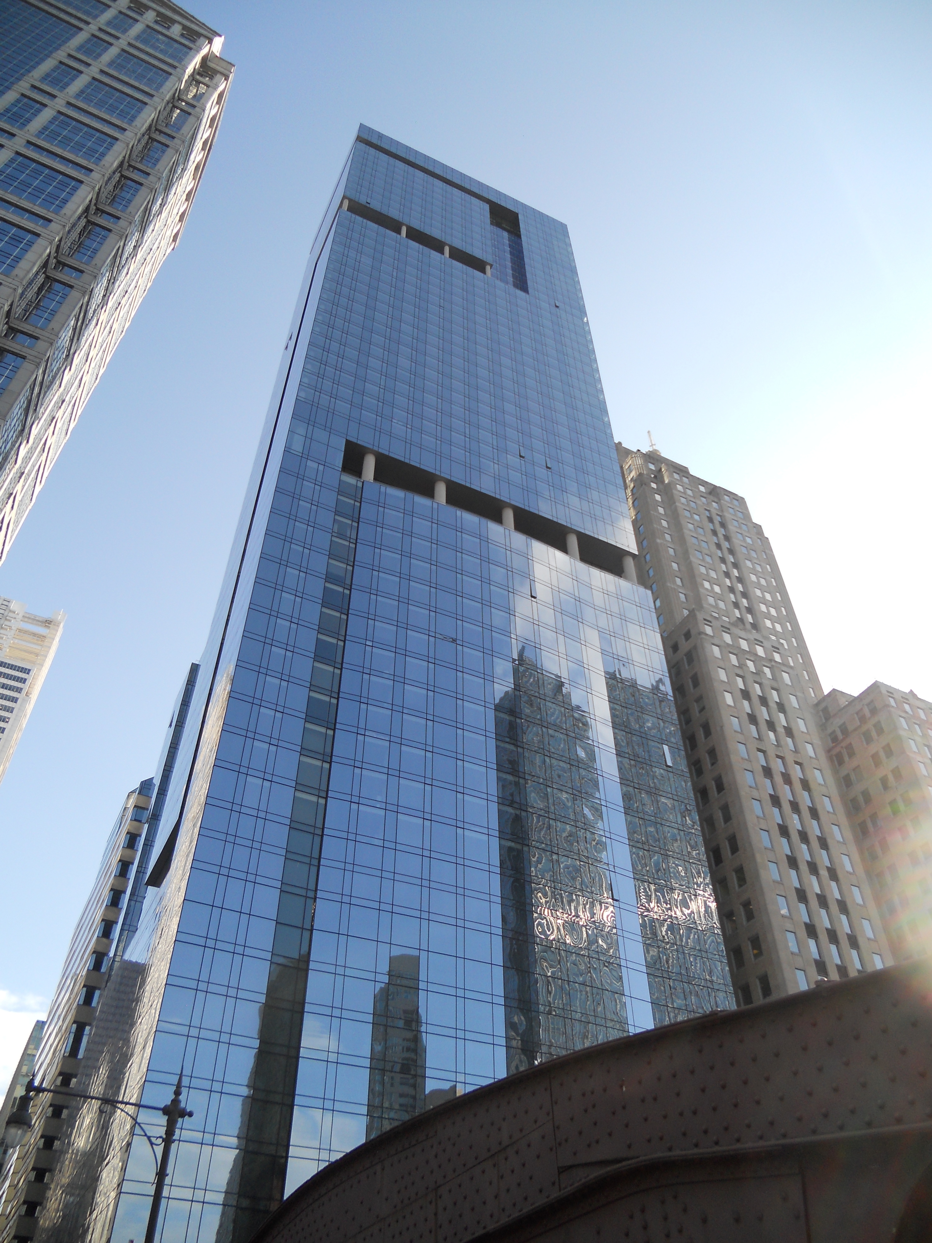 2015 Chicago 49